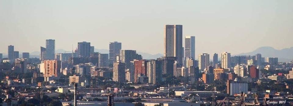 Vista de la zona metropolitana poniente de Guadalajara, Jalisco